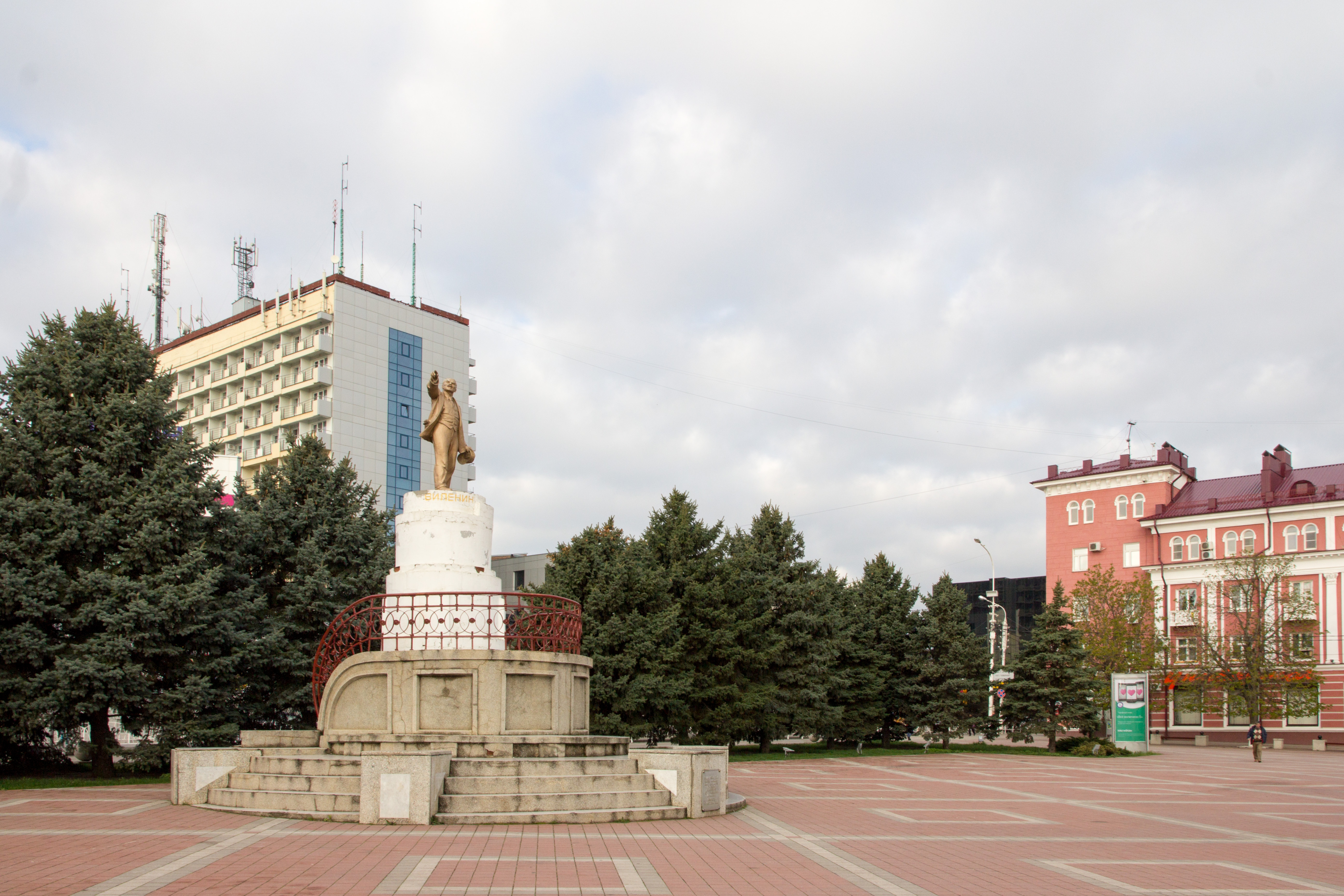 Armavir